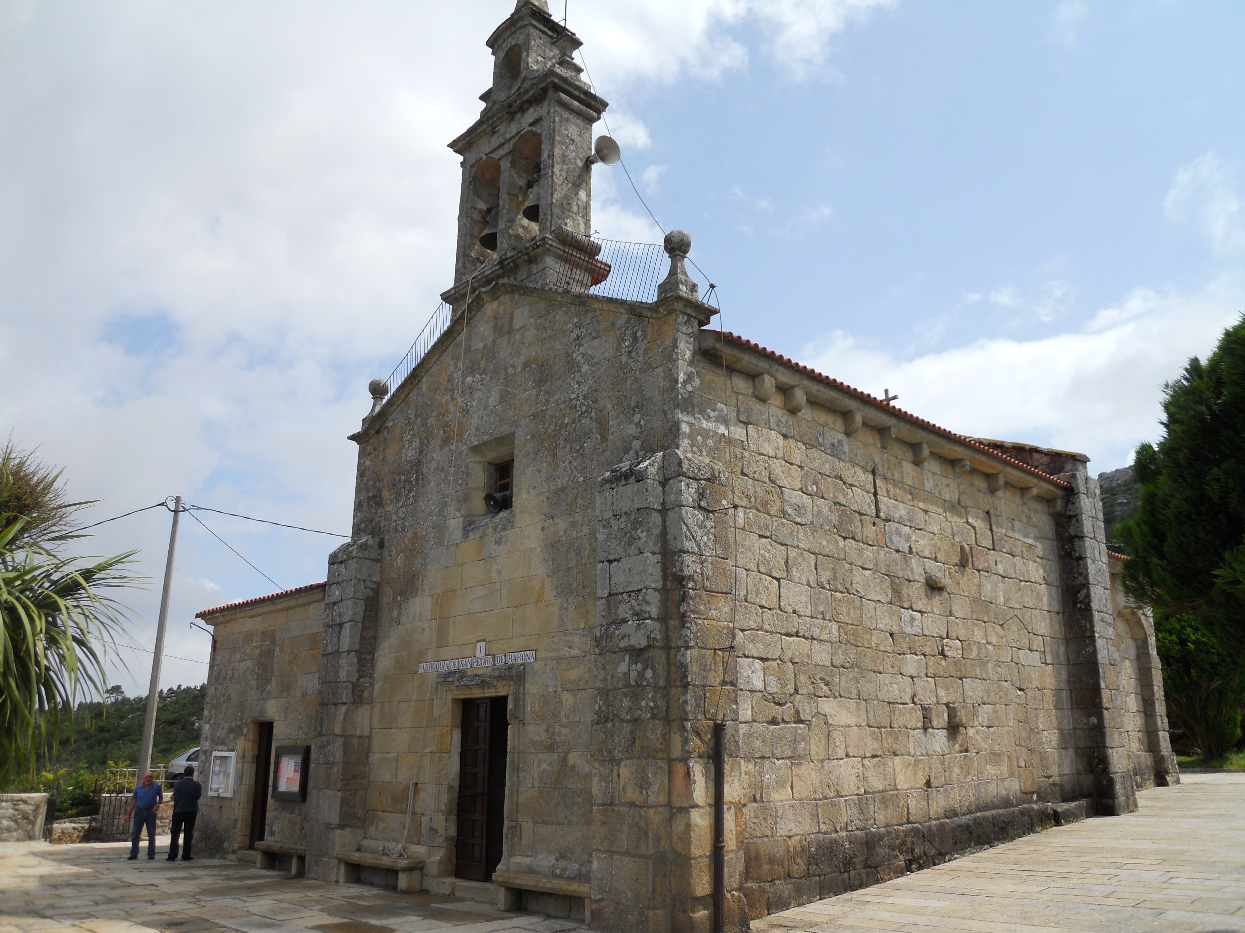 Construida en el siglo XII, pierde su fachada occidental y se le añade una nave en el lado norte que engloba la sacristía.